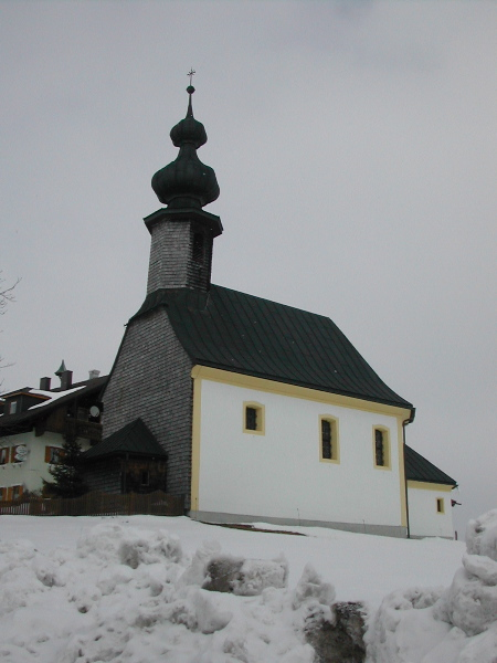 Kirche Toedtleinsdorf.